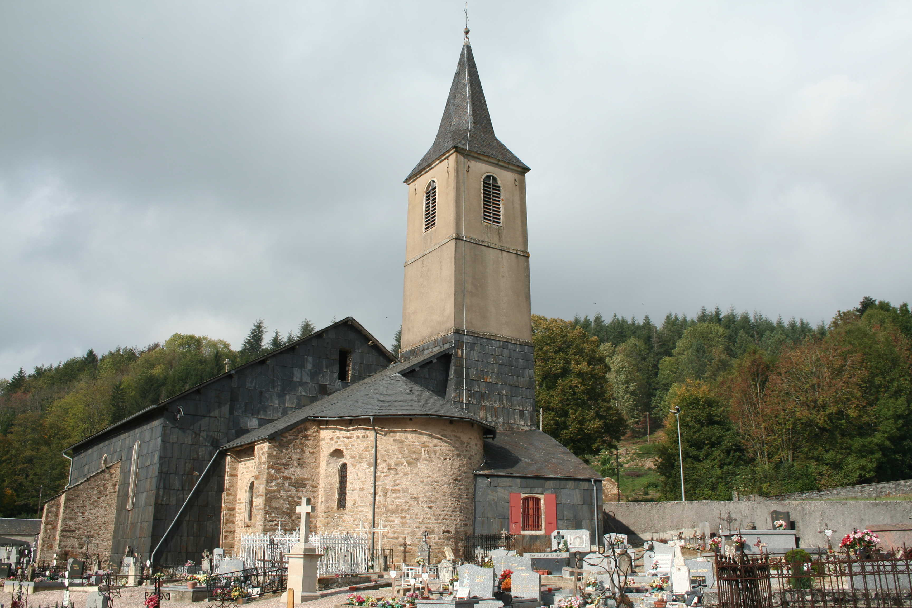 Église paroissiale Saint-Étienne de Murat-sur-Vèbre (Tarn) - Chevet roman.